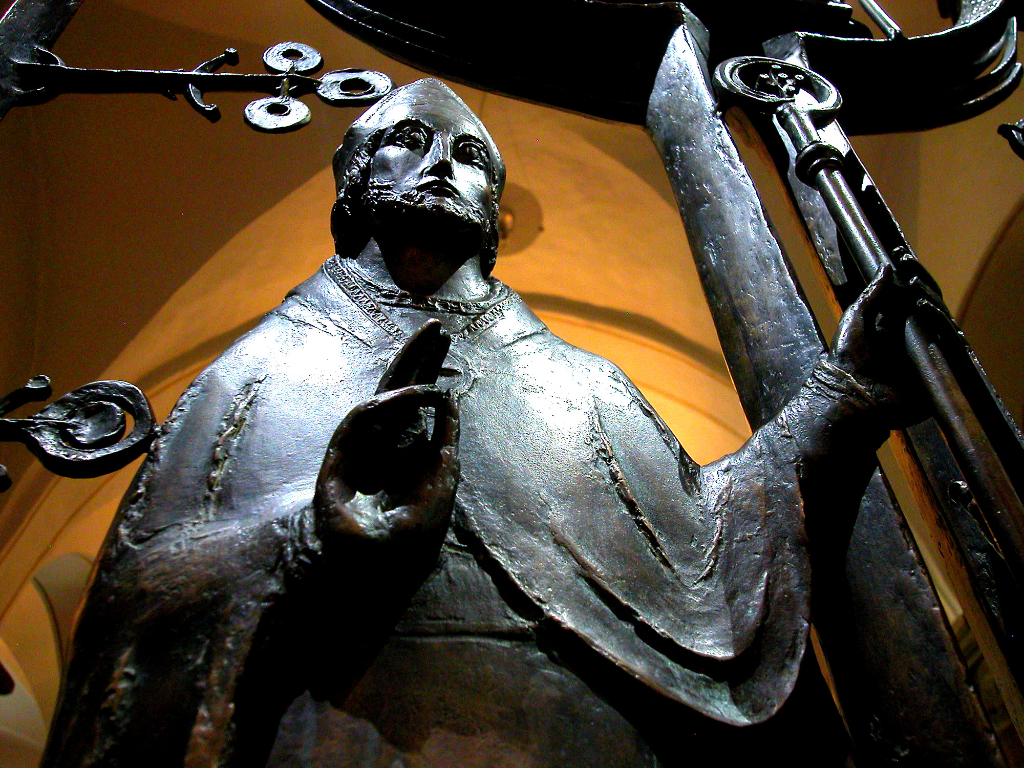 Hl. Thiatgrim, Kripta in Essen-Werden